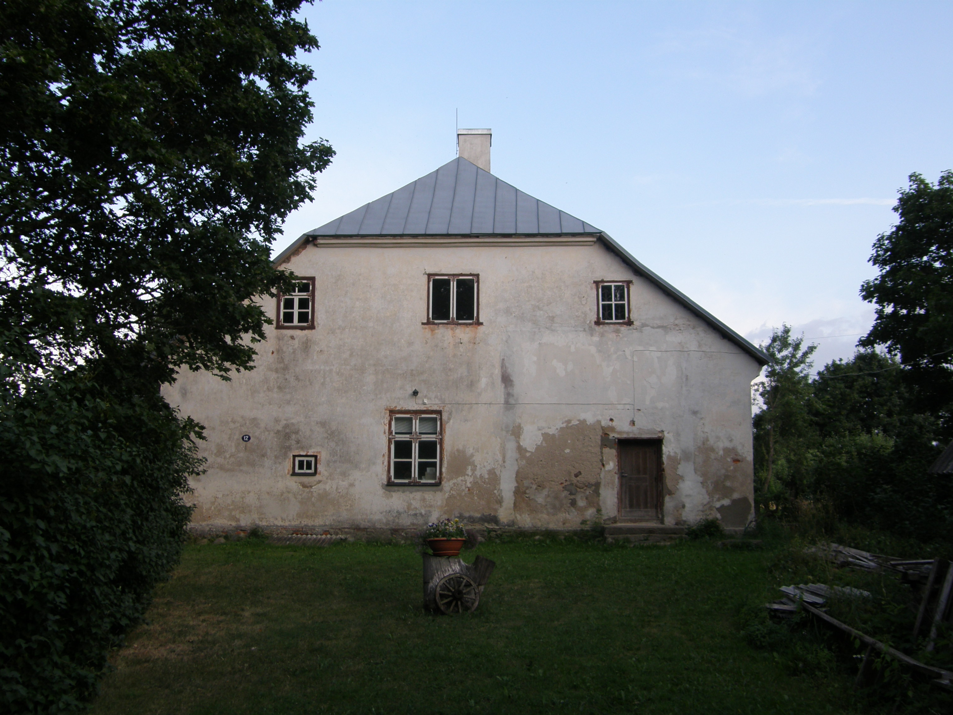 Torma pastoraadi peahoone